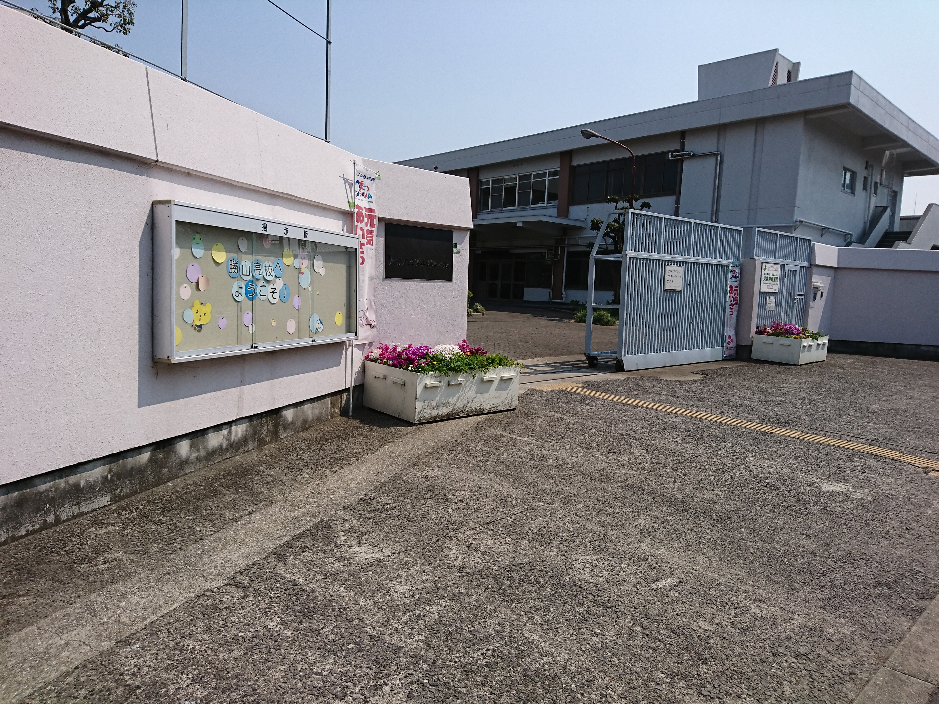 勝山高校の正門